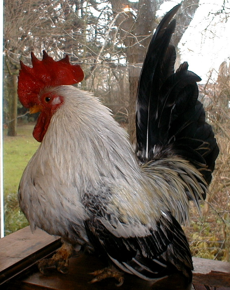 Eigen foto van Zwart-Witje, Zilverkleurig geboren op 5 mei 2003; deze kip is mijn persoonlijke eigendom, en beste maatje. Ik ben erg gehecht aan het beestje, het was dwaas van mij om mijn dierbaarste vriendje te grabbel te gooien op wikipedia.Helaas is er geen weg terug...Inmiddels is mijn vriendje overleden en heeft hij zijn ouders vervoegd. RIPCarolus 28 mei 2006 02:10 (CEST)